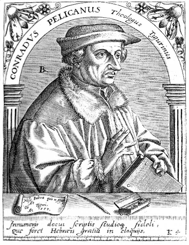 Kupferstich Konrad Pelikan oder Pellicanus, Conrad (1478-1556); Theologe